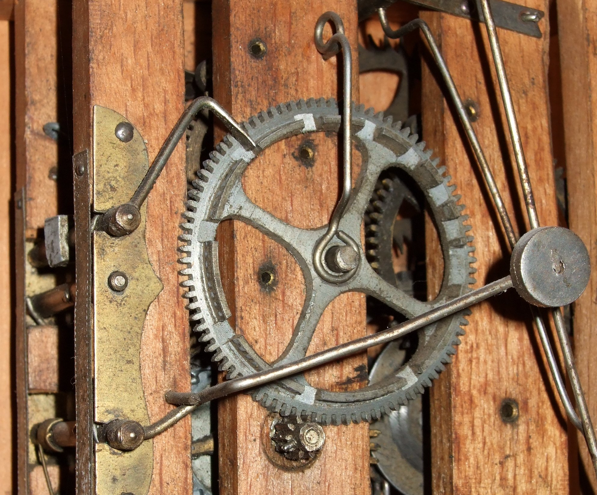 Uhr aus dem Schwarzwald. Vermutlich 19. Jahrhundert. Holzplatinenwerk. Hier: Schloßscheibe